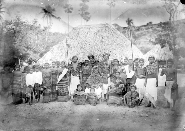 Negatief. De Radja van Liae met gezin, Sawoe